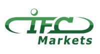 IFC Markets Corp.